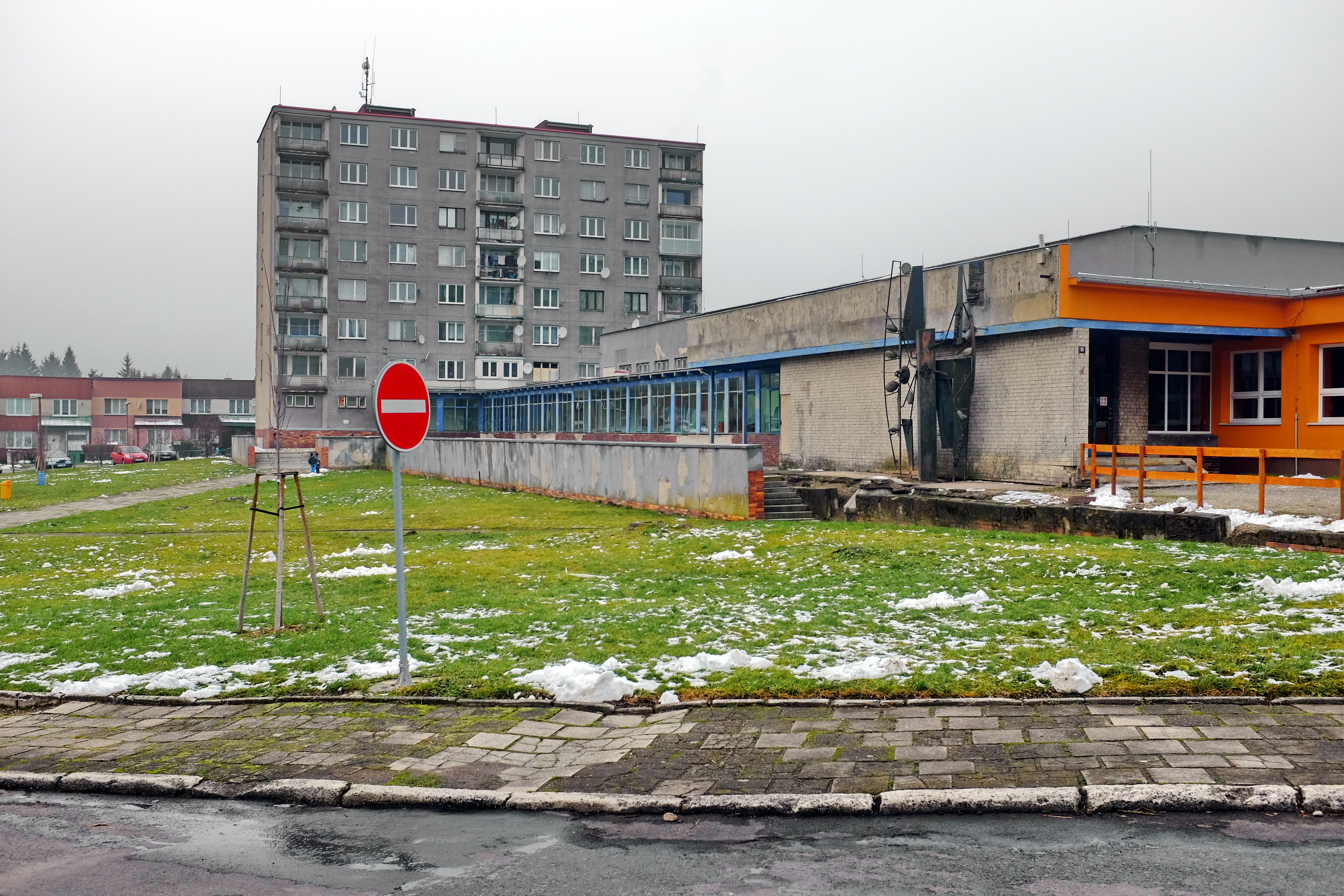 Obec Rovná, Slavkovský les, okres Sokolov